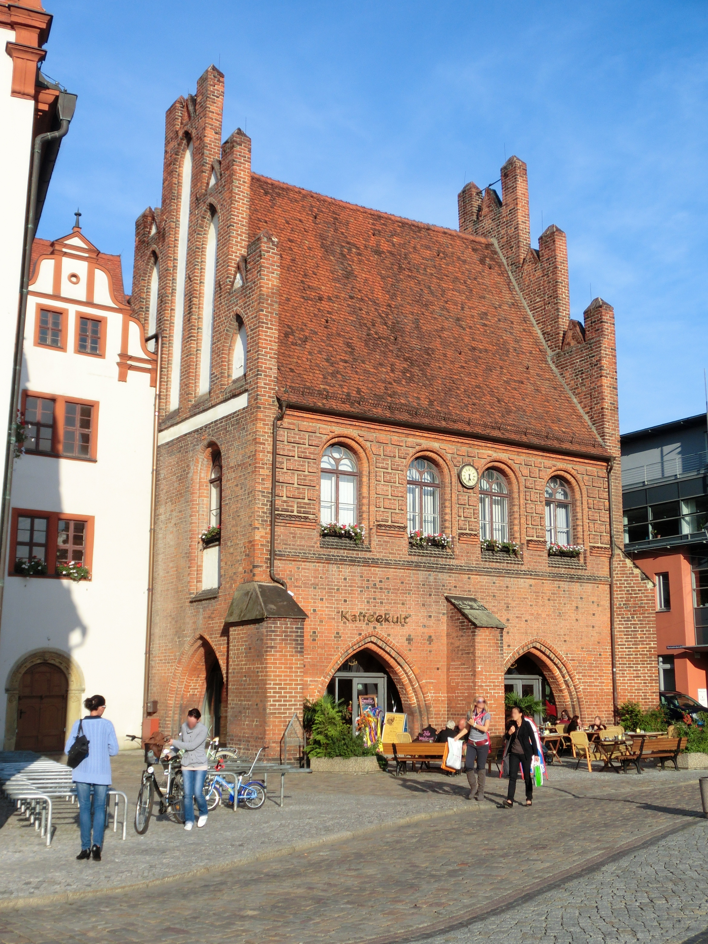 Stendal Marienkirchstraße Gerichtslaube